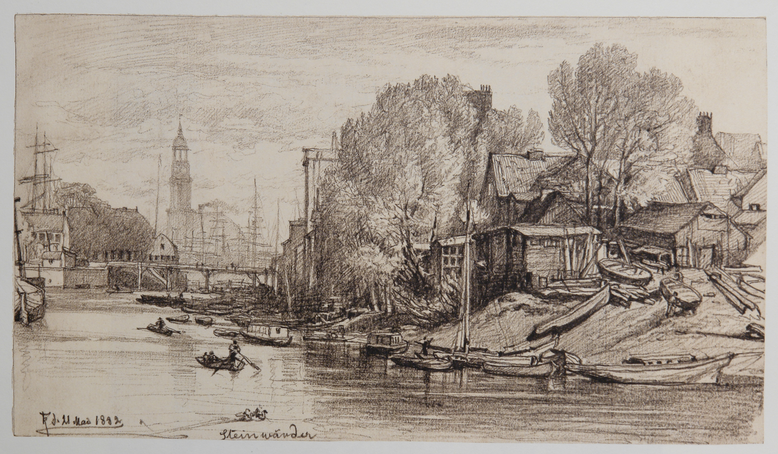 HAMBURG. Augenblicke einer Stadt 1882-1894. In 50 Zeichnungen von Johann Theobald Riefesell nach Originalen im Museum für Hamburgische Geschichte.